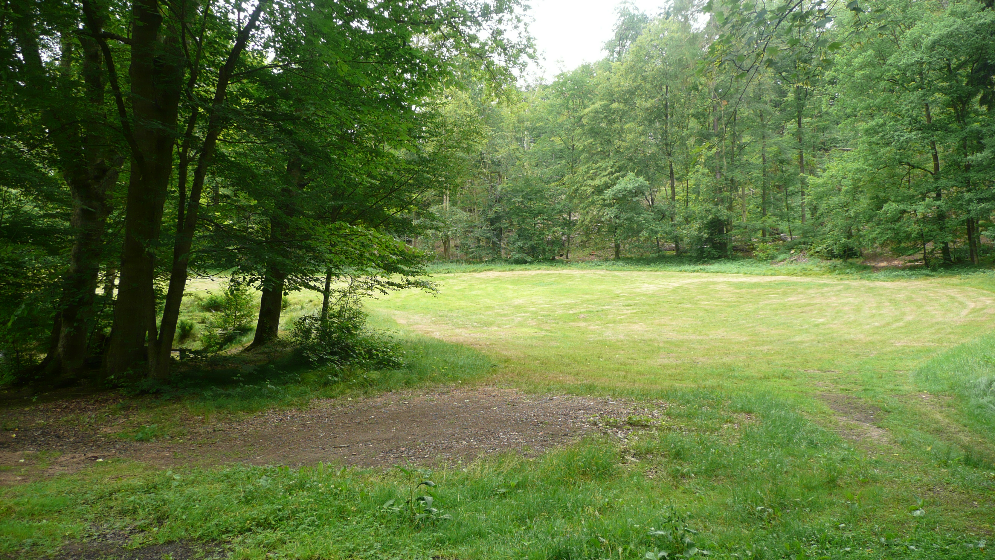 Festwiese im Seifersdorfer Tal in Sachsen